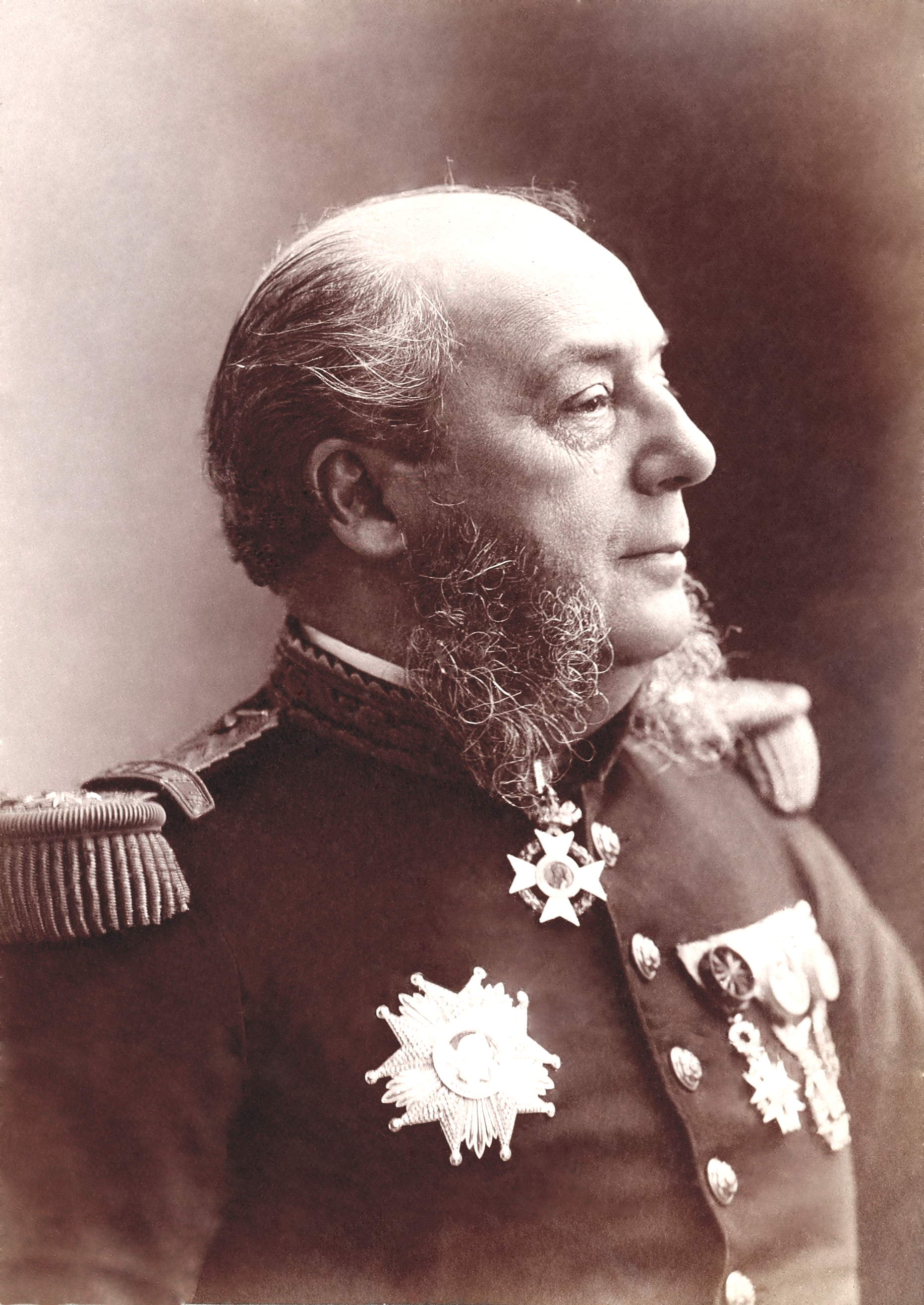 Paul-Émile Miot, (1827 - 1900), amiral, explorateur et photographe français.